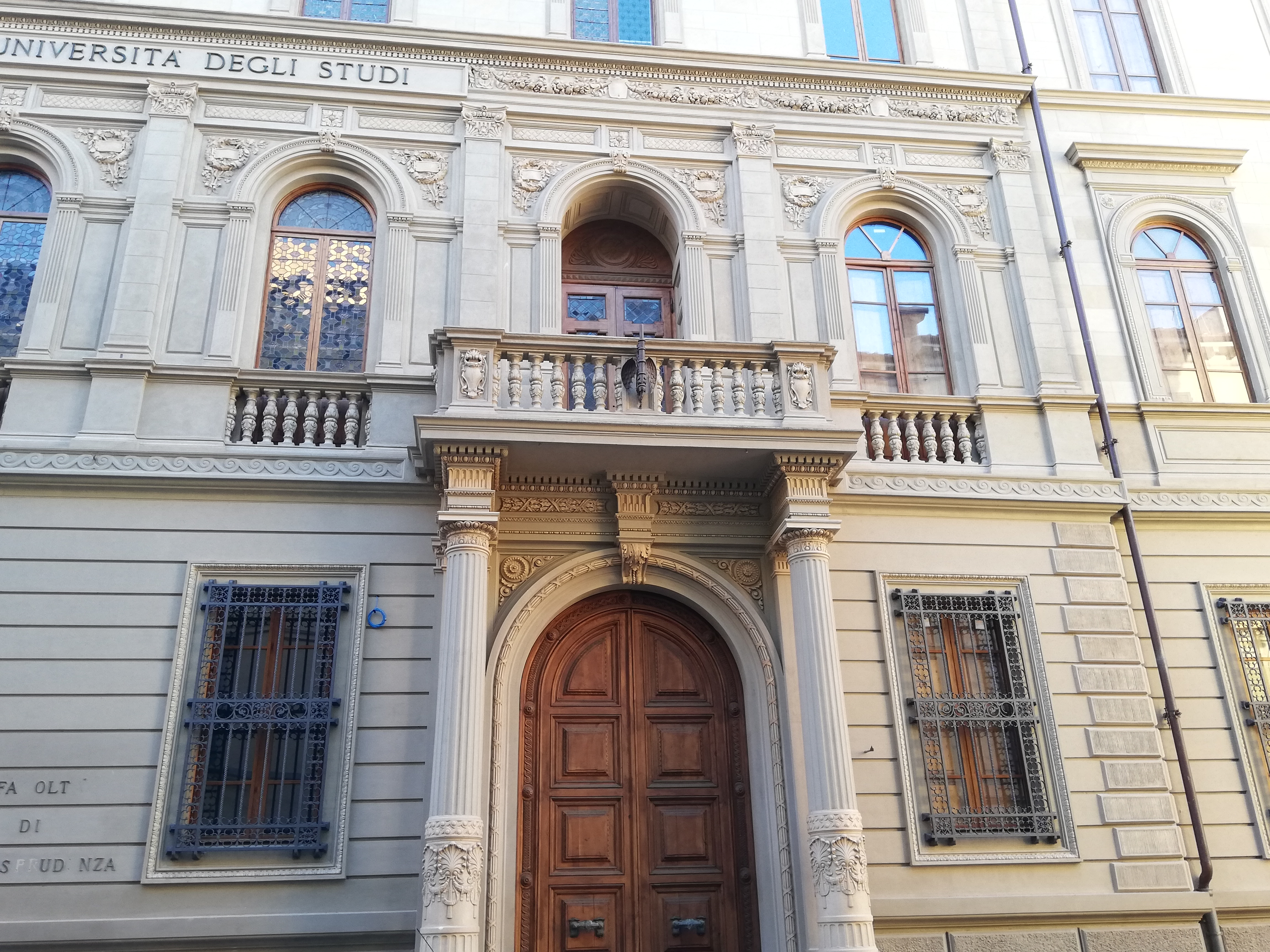 Palazzo della Sapienza (Pisa), porta destra su via Curtatone e Montanara This is a photo of a monument which is part of cultural heritage of Italy.